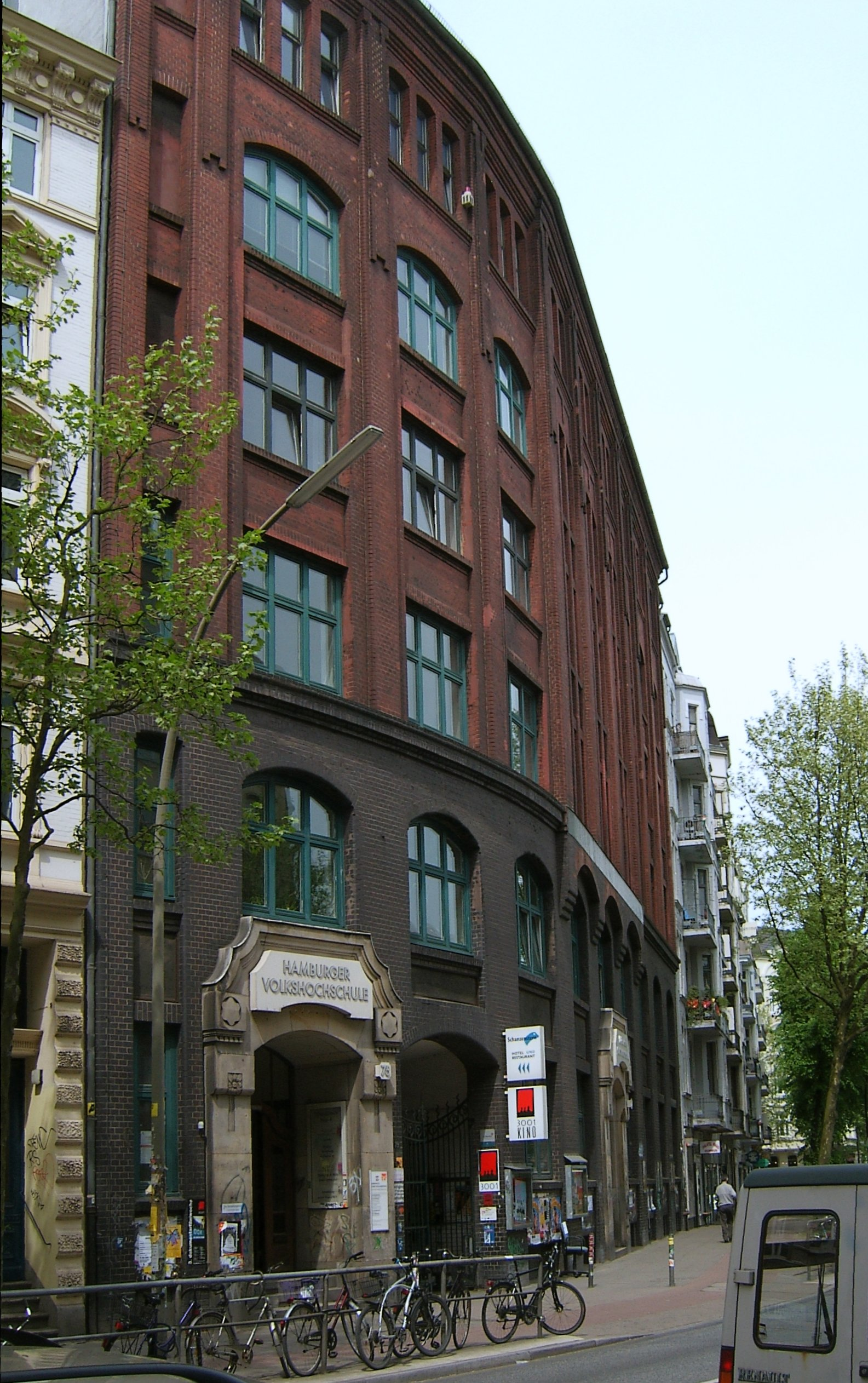 Das ehemalige Verwaltungsgebäude des Schreibutensilien-Herstellers Montblanc in der Schanzenstraße im Schanzenviertel in Hamburg wird heute von der Hamburger Volkshochschule genutzt.